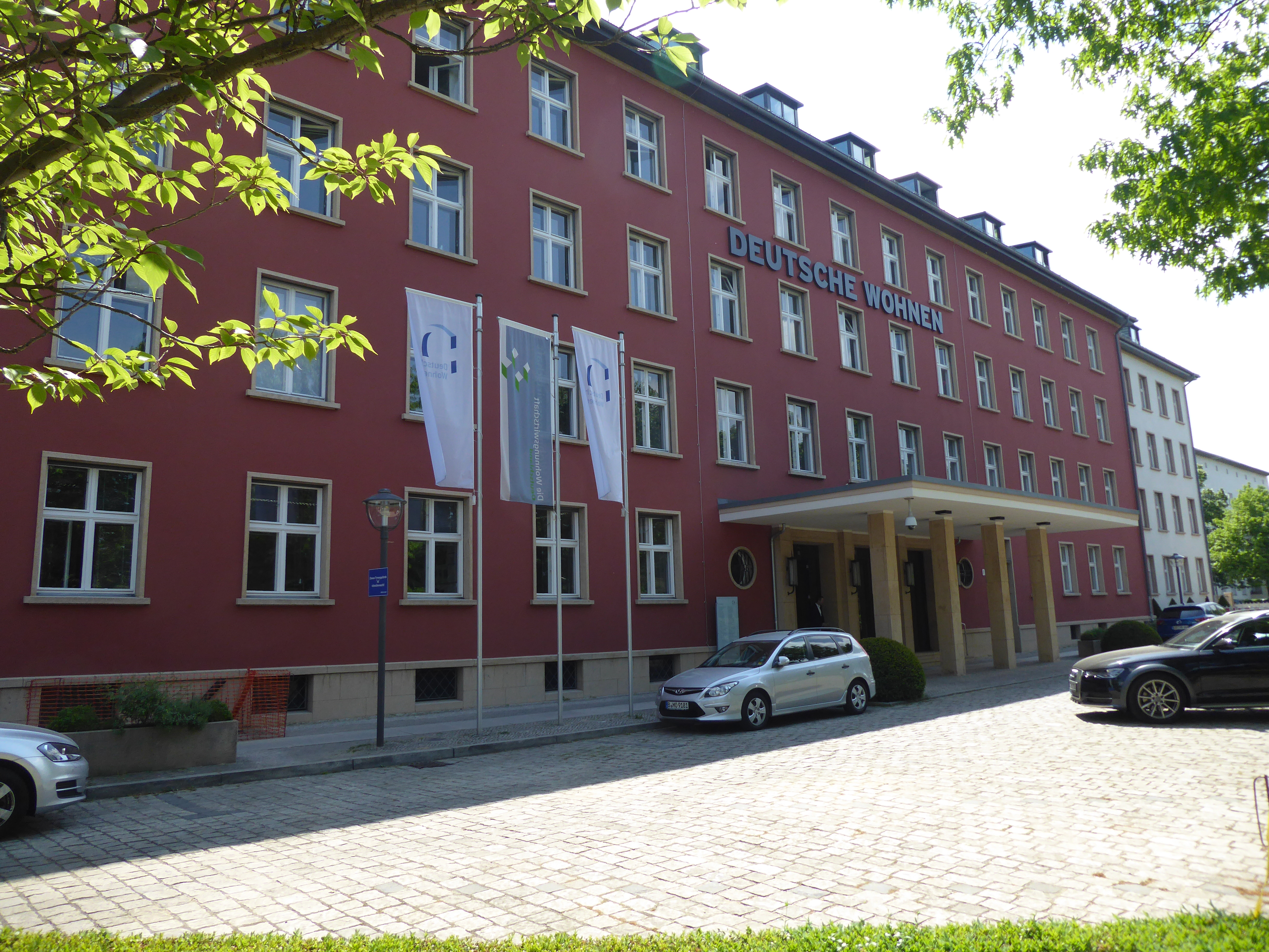 Wilmersdorf Mecklenburgische Straße Deutsche Wohnen